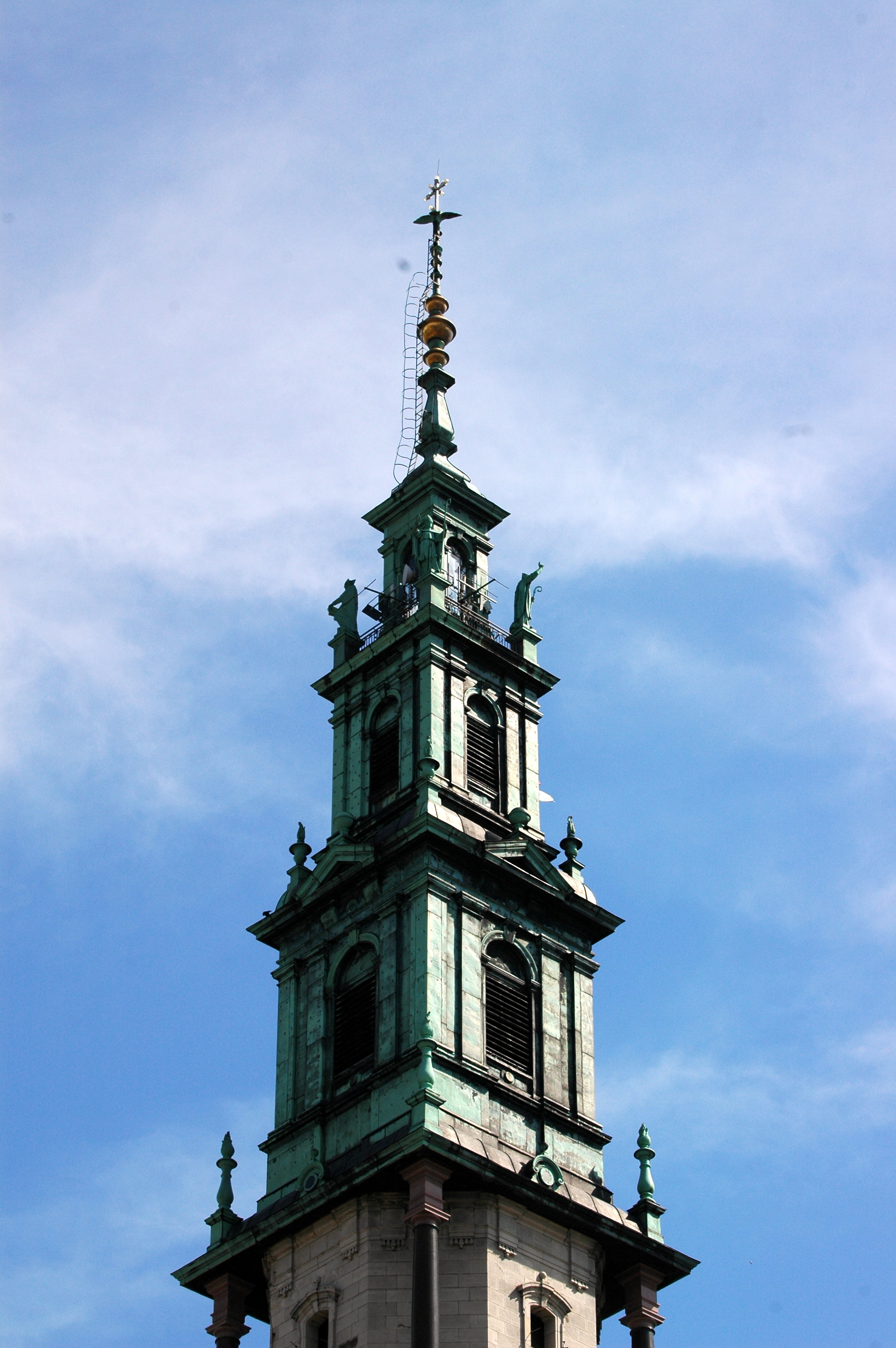 Częstochowa: Jasna Góra